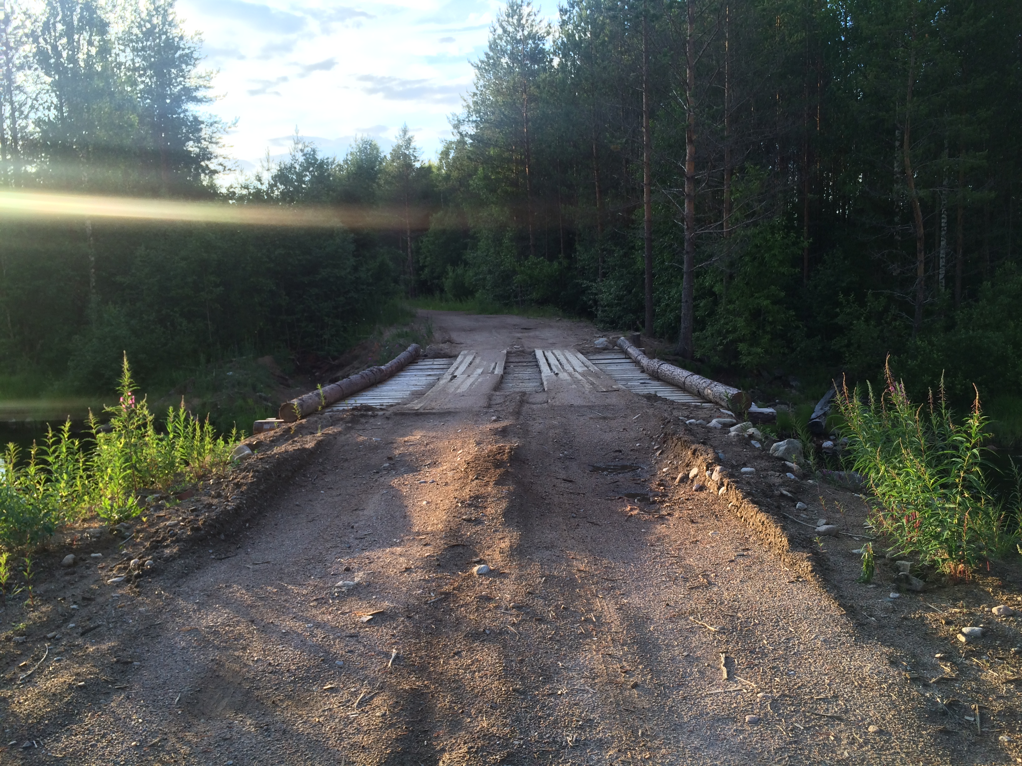 Иляйоки